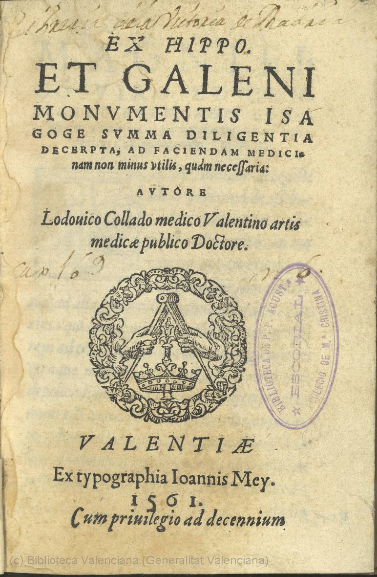 Luis Collado, Ex Hippo. et Galeni monumentis Isagoge summa diligentia decerpta ad faciendam medicinam non minus utilis quam necessaria, Valentiae : ex typographia Ioannis Mey, 1561. Biblioteca Valenciana Digital